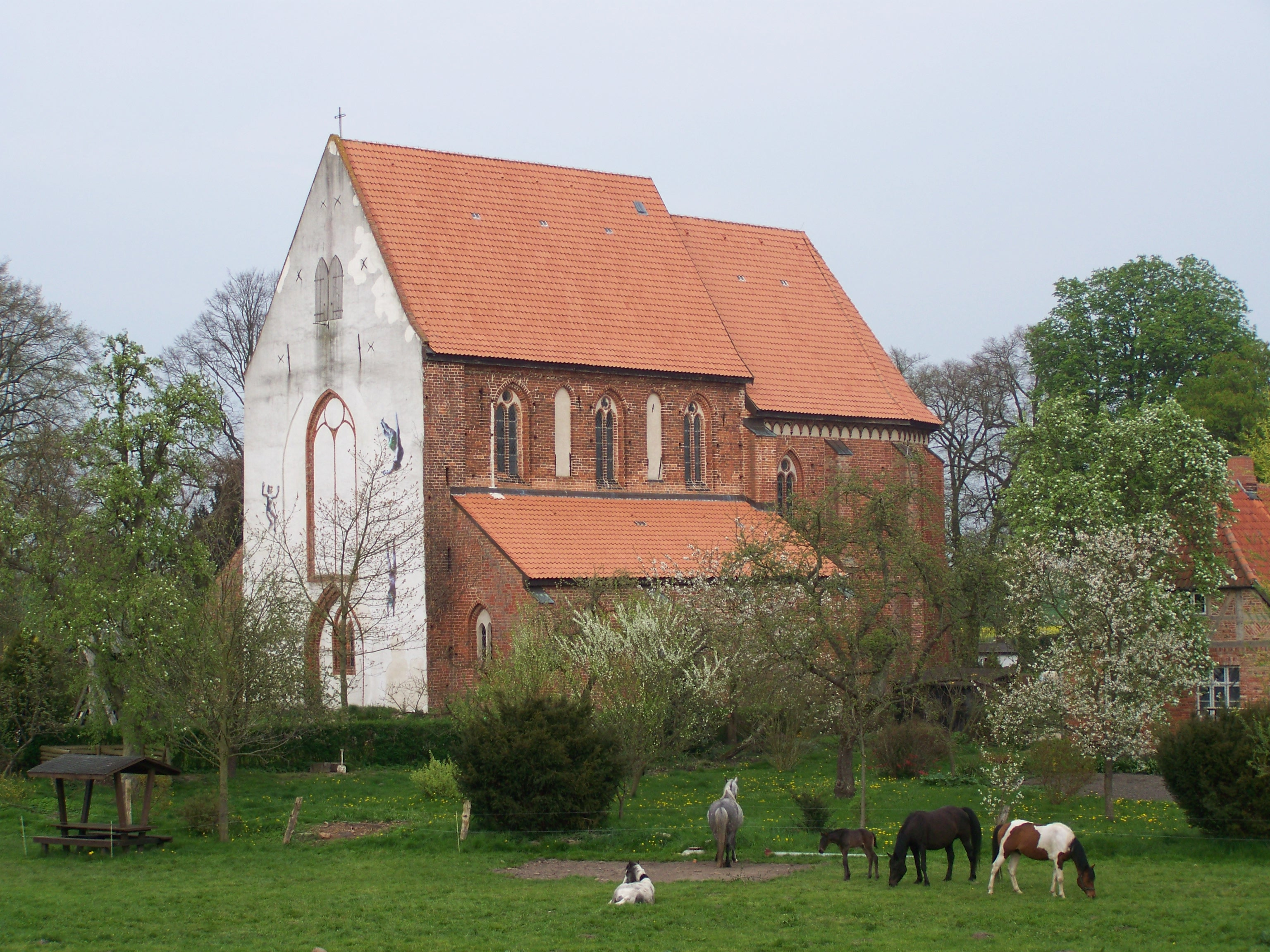 Dorfkirche Starkow, Giebelansicht (2008-04-30)